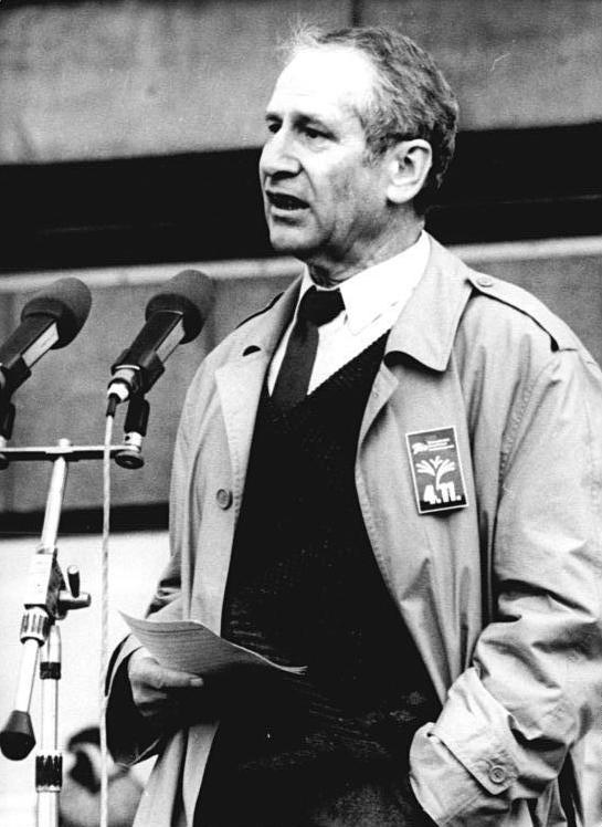 ADN-ZB Link 4.11.89 Berlin: Demonstration 500.000 Bürger beteiligten sich an einer Demonstration für den Inhalt der Artikel 27 und 28 der Verfassung der DDR. Auf dem anschließenden Meeting auf dem Alexanderplatz ergriff auch der Schriftsteller Markus Wolf das Wort.